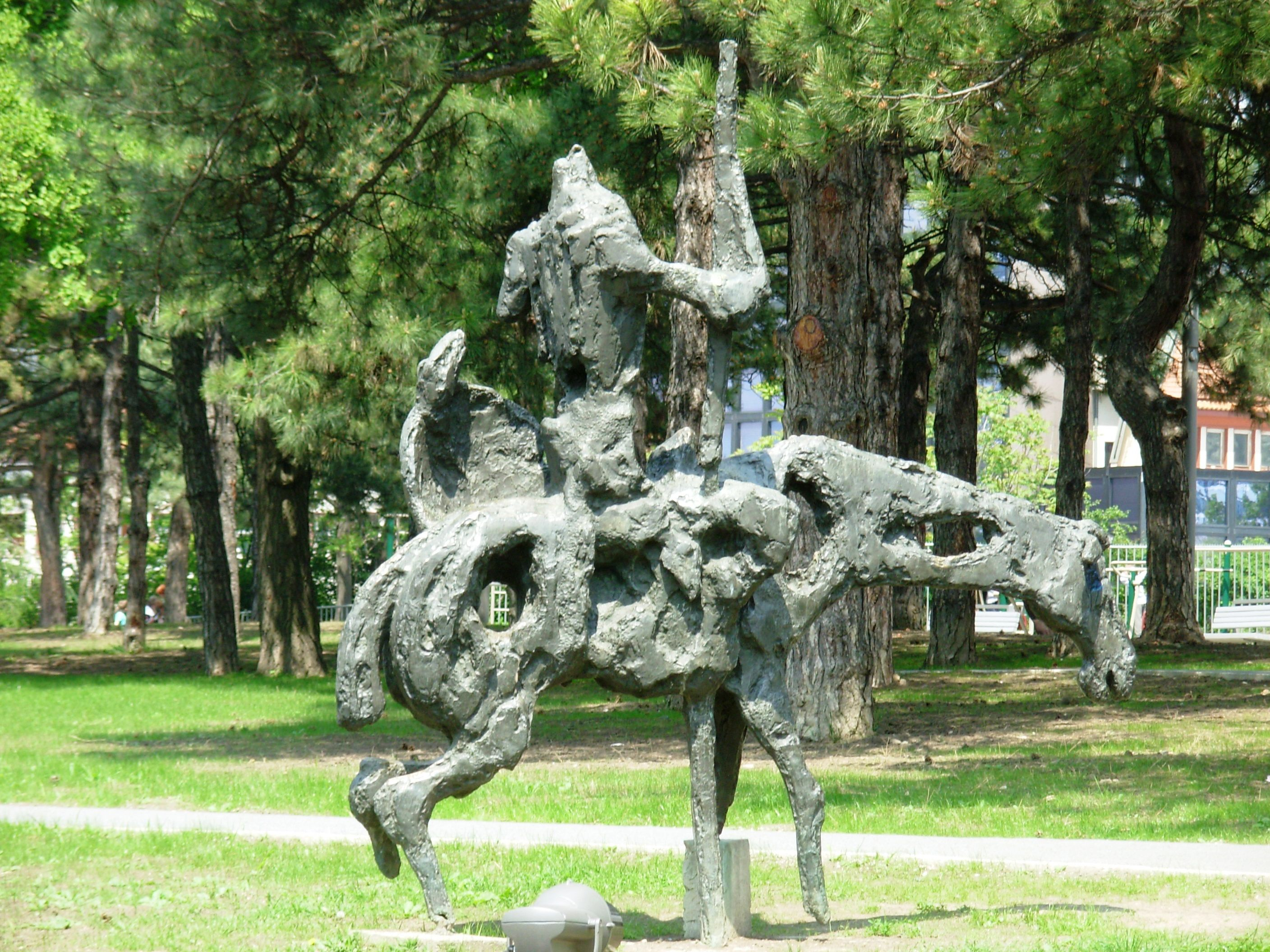 Дон Кихот у Ташмајданском парку, Београд, Србија